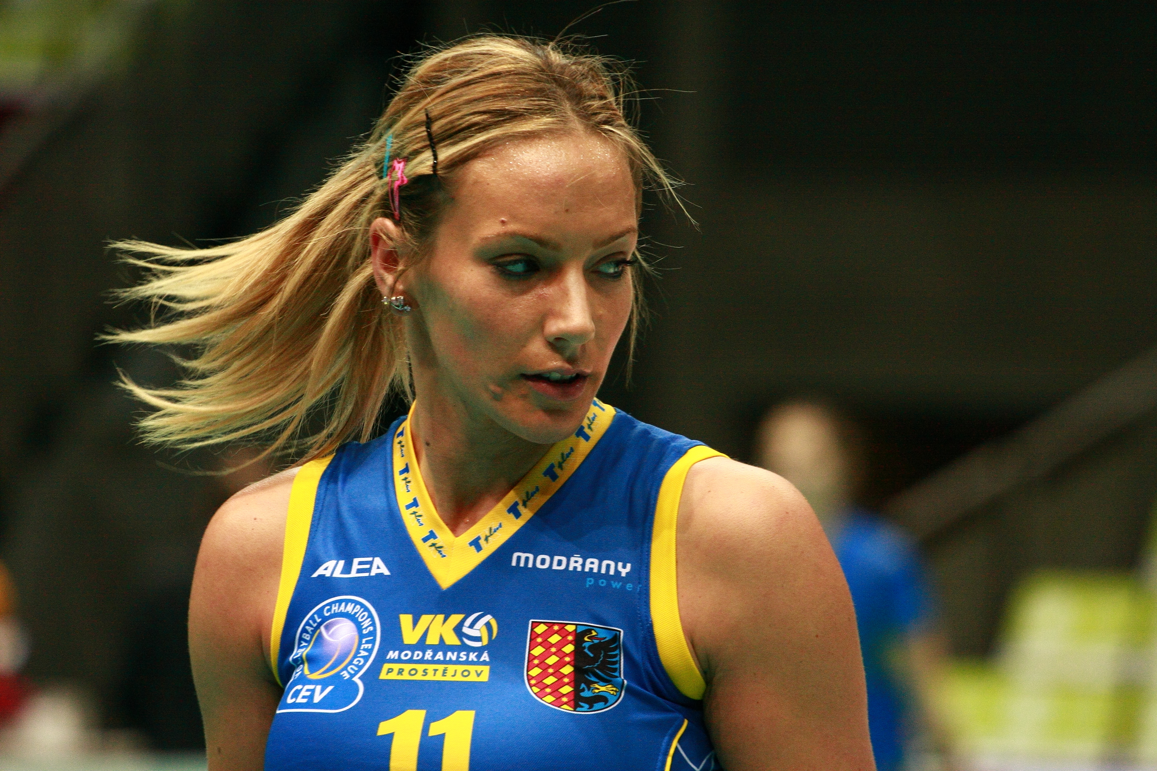 Atom Trefl Sopot vs VK Modranska Prostejov (CZE)